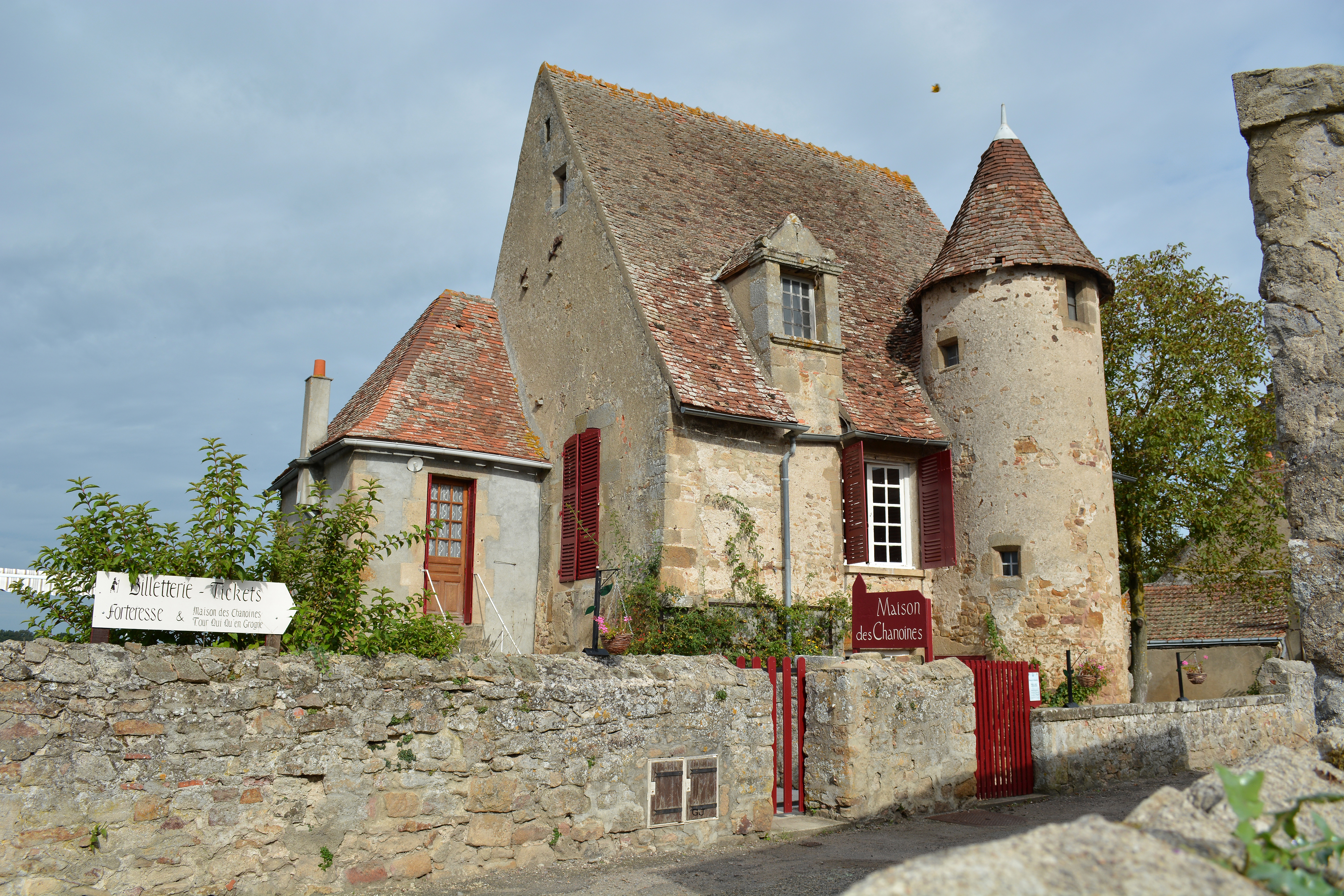 Maison du 15 ème siècle située dans le quartier de la Sainte Chapelle.Dans la rue qui mène à l'actuelle entrée du château.